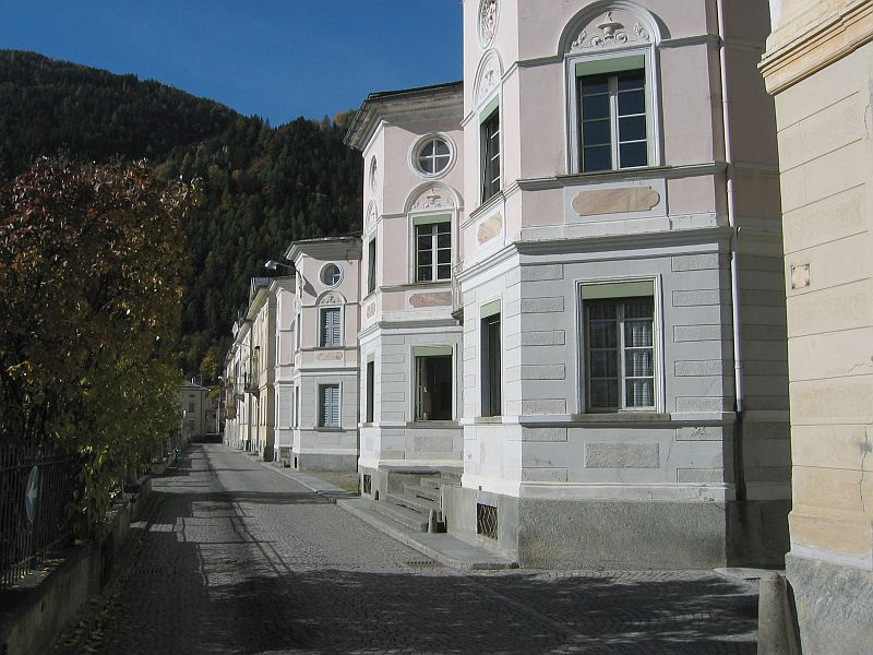 Poschiavo (CH-GR), Via di Palaz